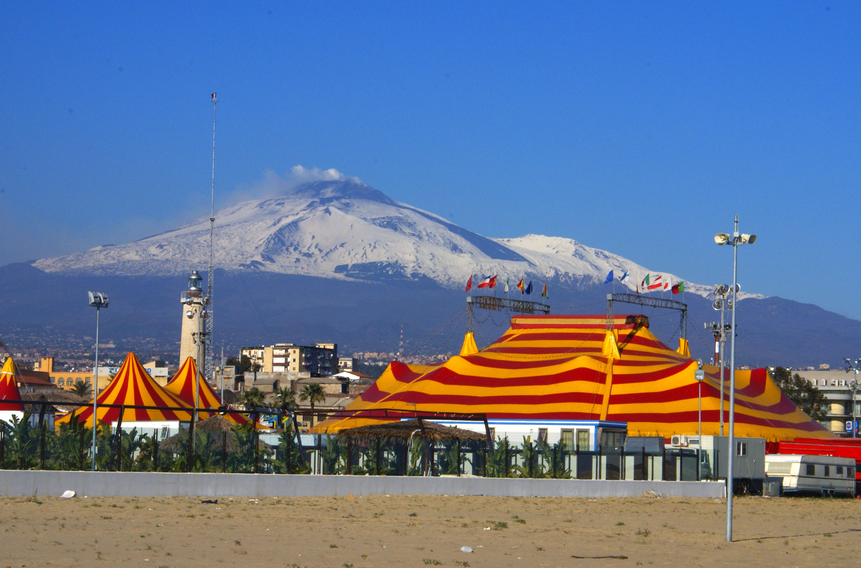 Un circo a Catania e sullo sfondo l'Etna.